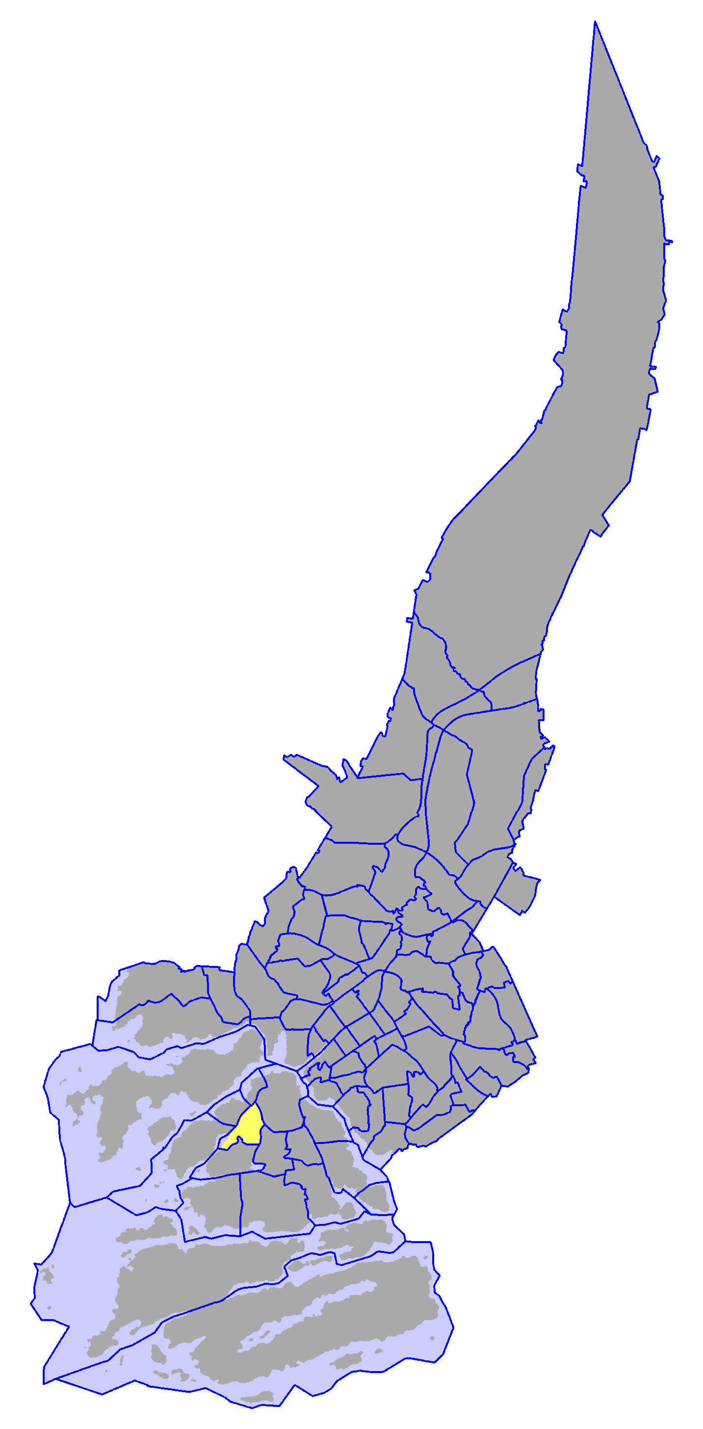 District of Särkilahti, in Turku